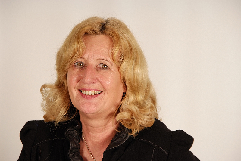 Gabriela König, Landtagsabgeordnete Niedersachsen, 16. Wahlperiode (Fotoprojekt Landtagsabgeordnete Niedersachsen am 24. und 25. November 2009)